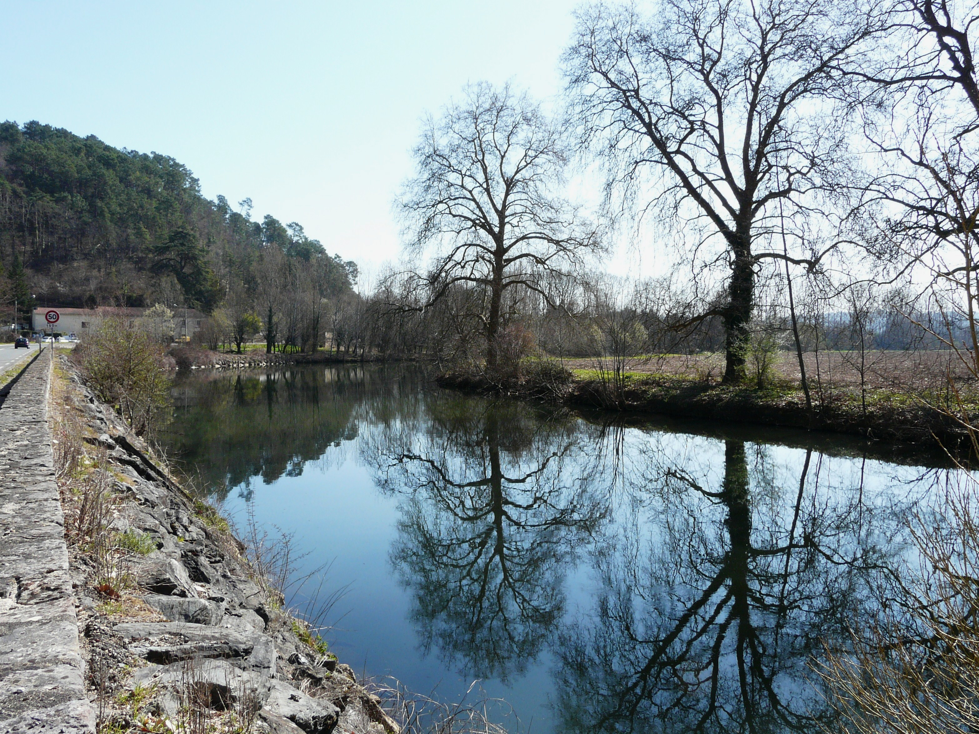 L'Isle au Pas de l'Anglais entre Chancelade (à gauche) et Marsac-sur-l'Isle (à droite), Dordogne, France. Vue prise vers l'amont.